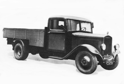 Praga RN jedné z raných předválečných sérií.